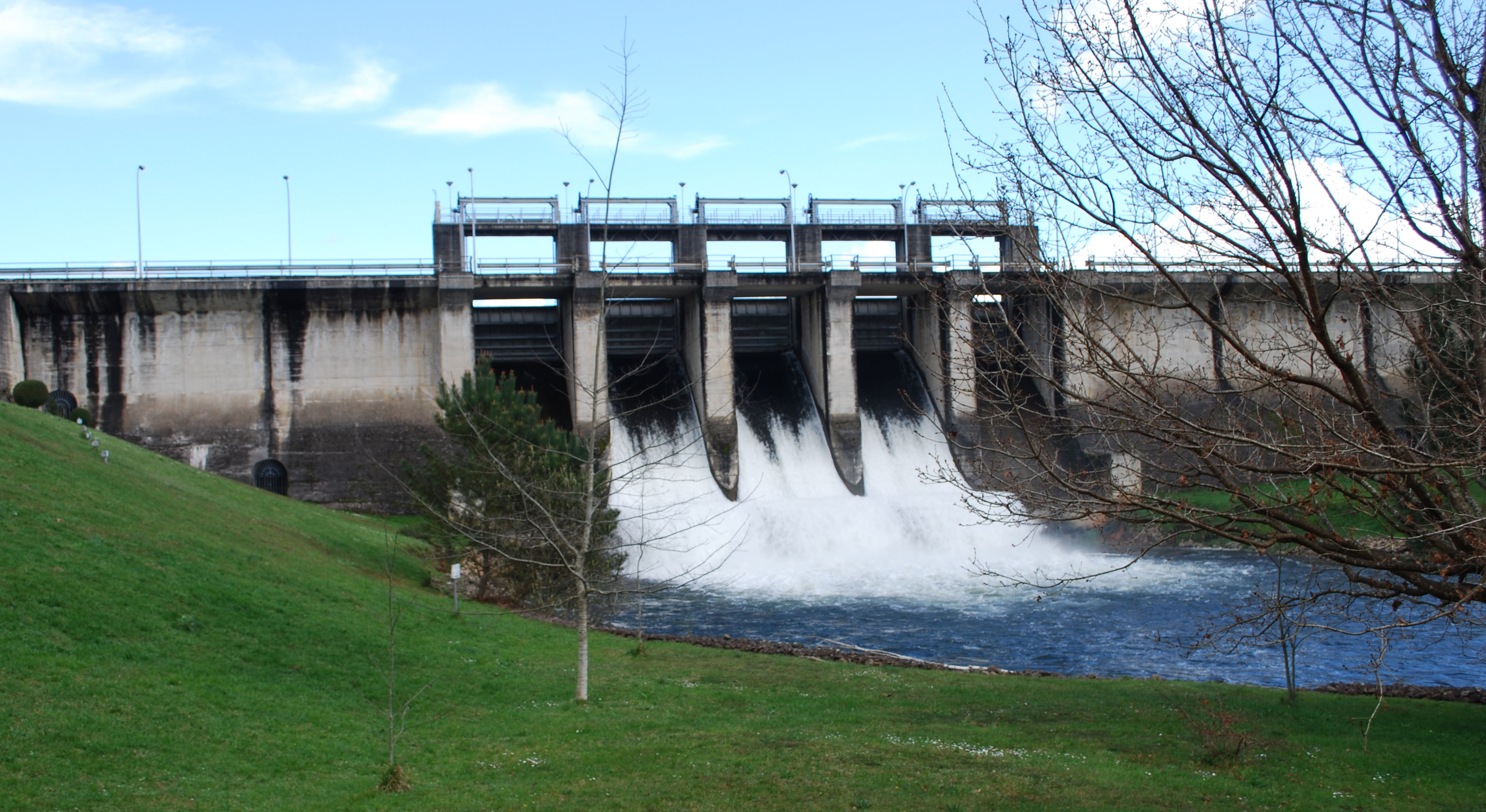 Presa encoro de Cecebre río Mero Cambre, A Coruña Galiza Spain